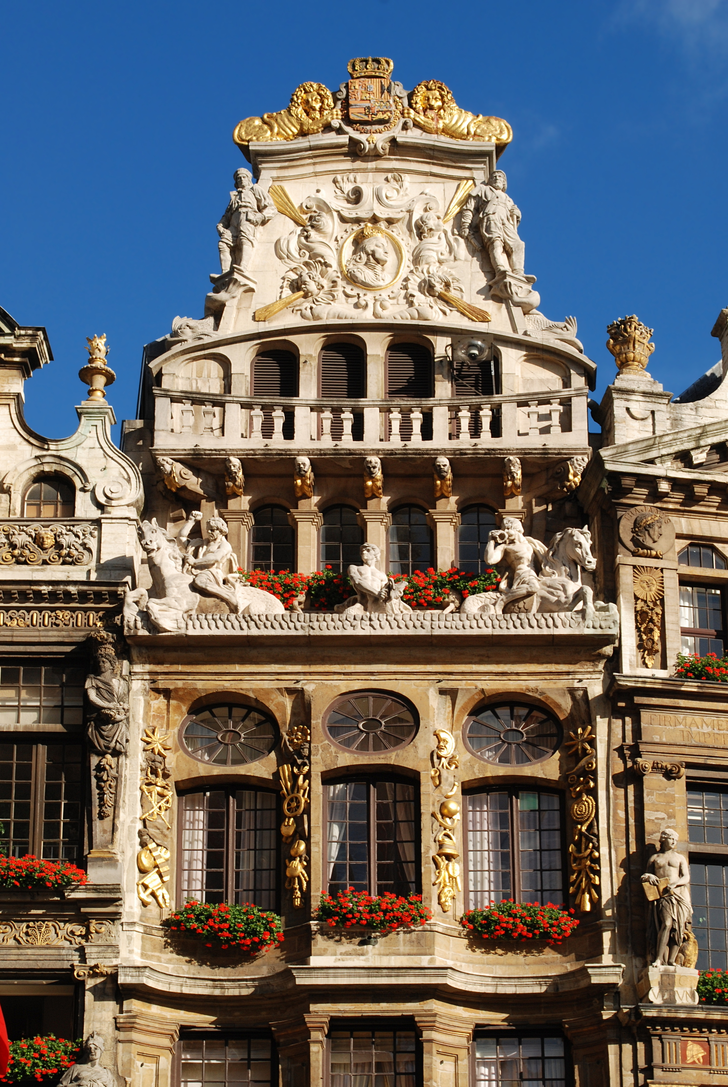 Belgique - Bruxelles - Maison du Cornet